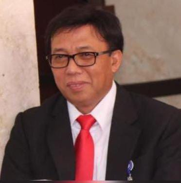 Muhammad Hudori Sekretaris Jenderal Kementerian Dalam Negeri